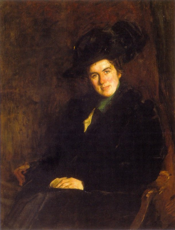 Portrait of Lide Arntzenius-Doorman, undated, oil on canvas, Gemeentemuseum Den Haag